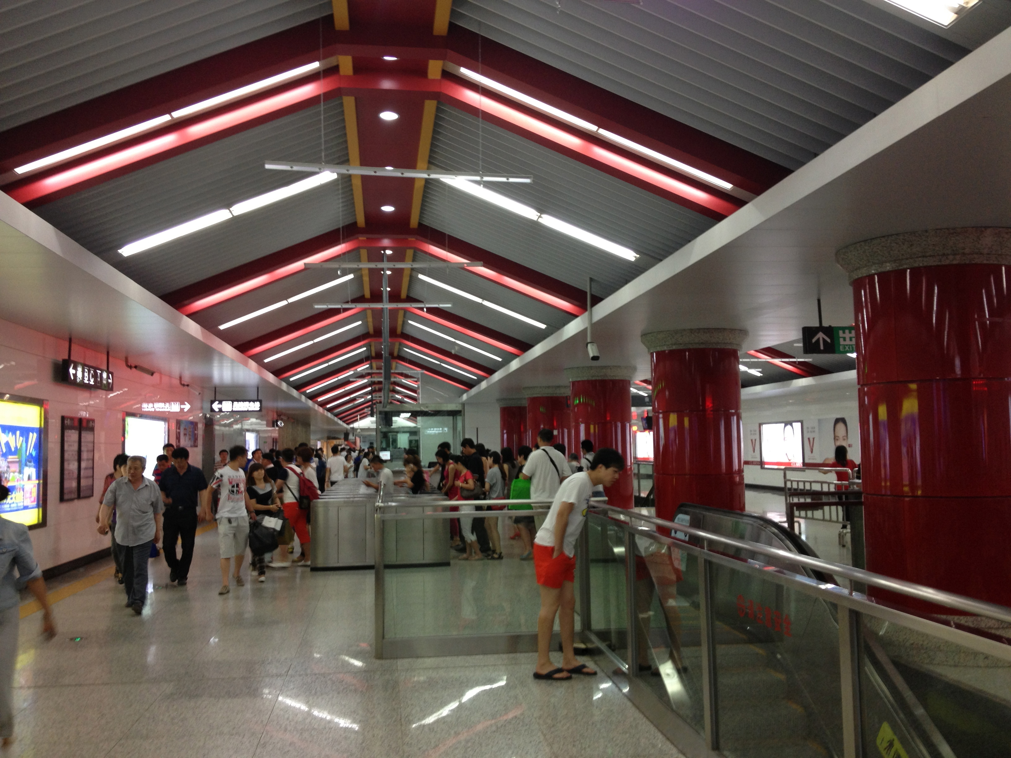 沈阳地铁中街站